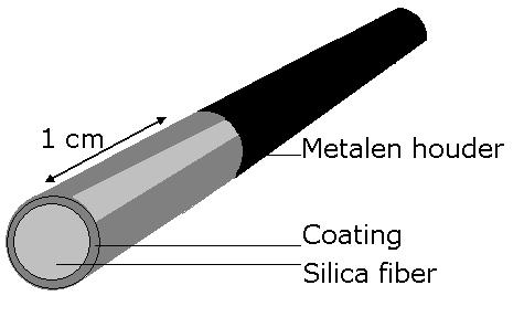 Zelf gemaakt